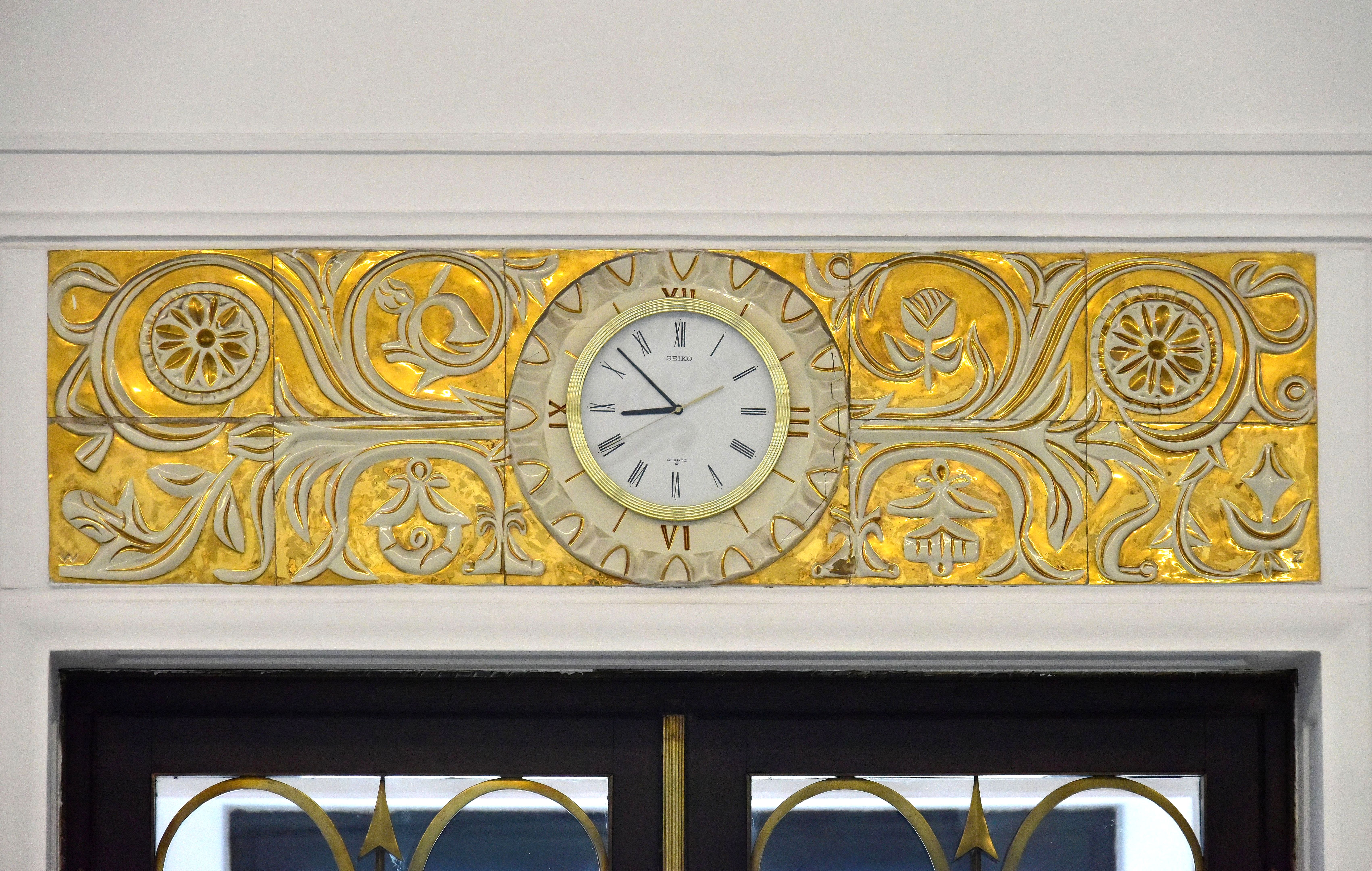 Zegar w holu głównym Sejmu (budynek C-D)